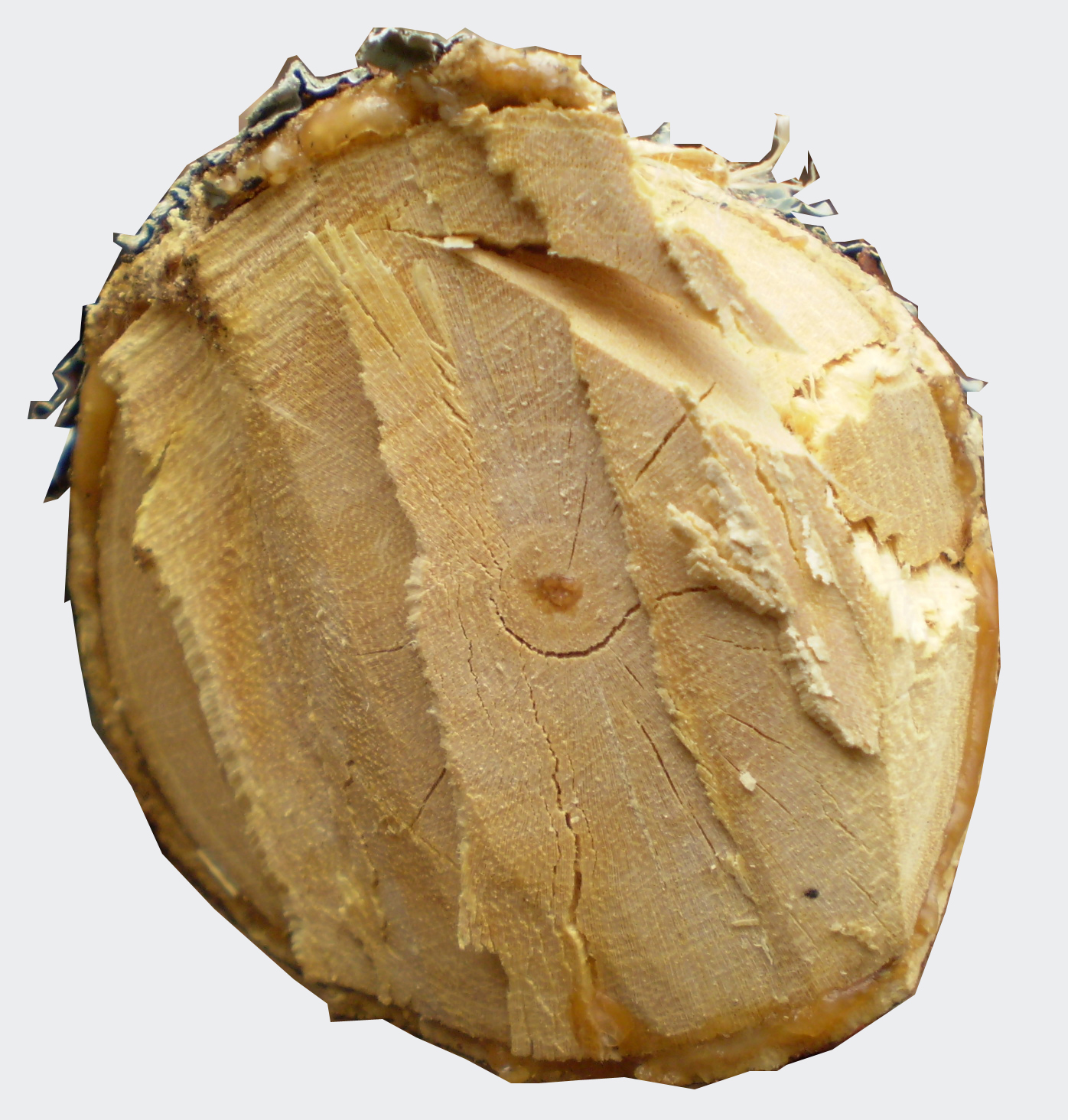 Mặt cắt của thân cây mít